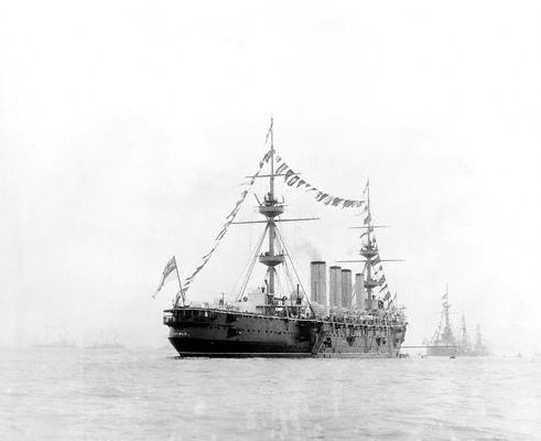 Fleet Review